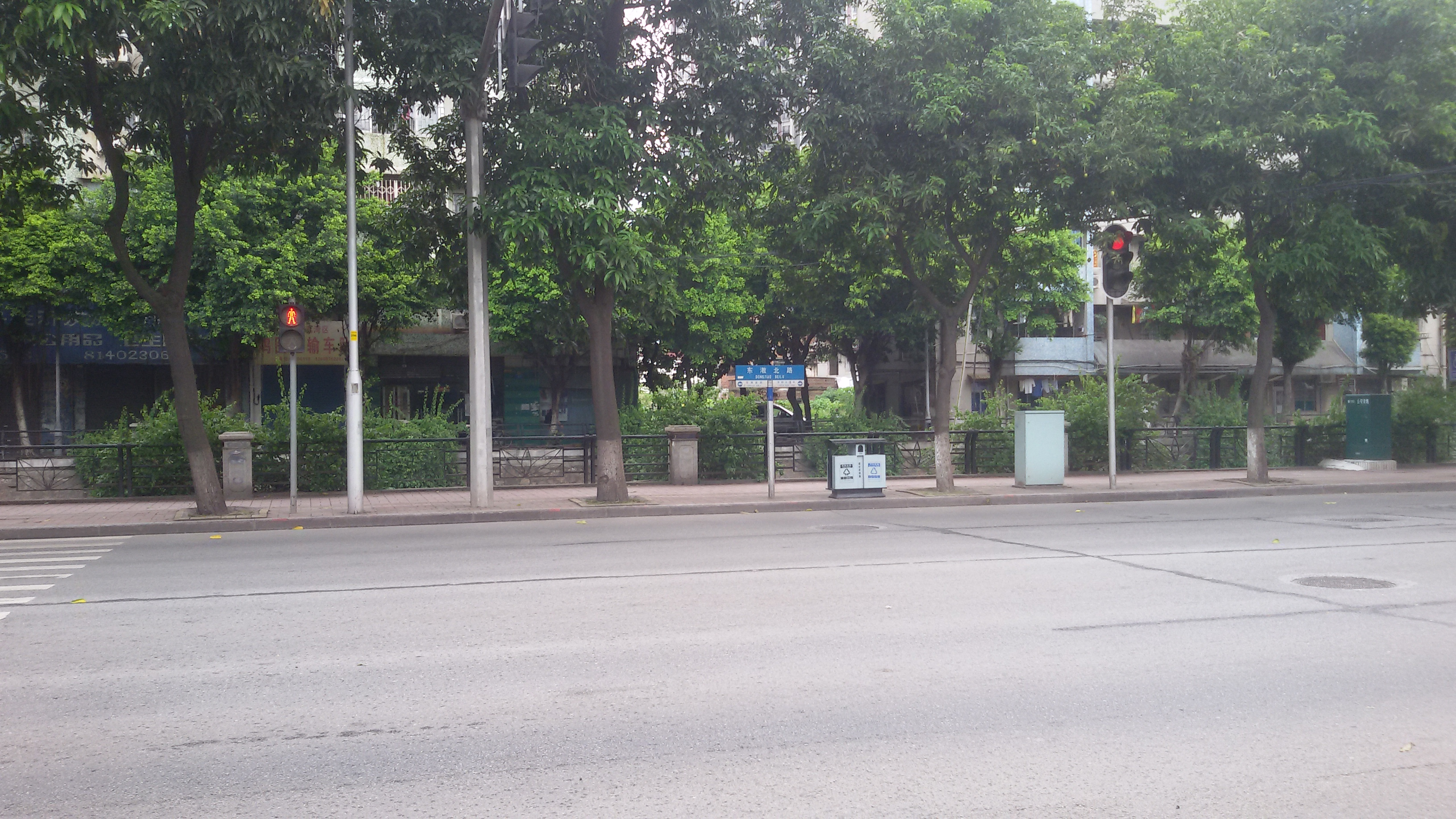 粵語: 東漖路嘅喜鵲路口